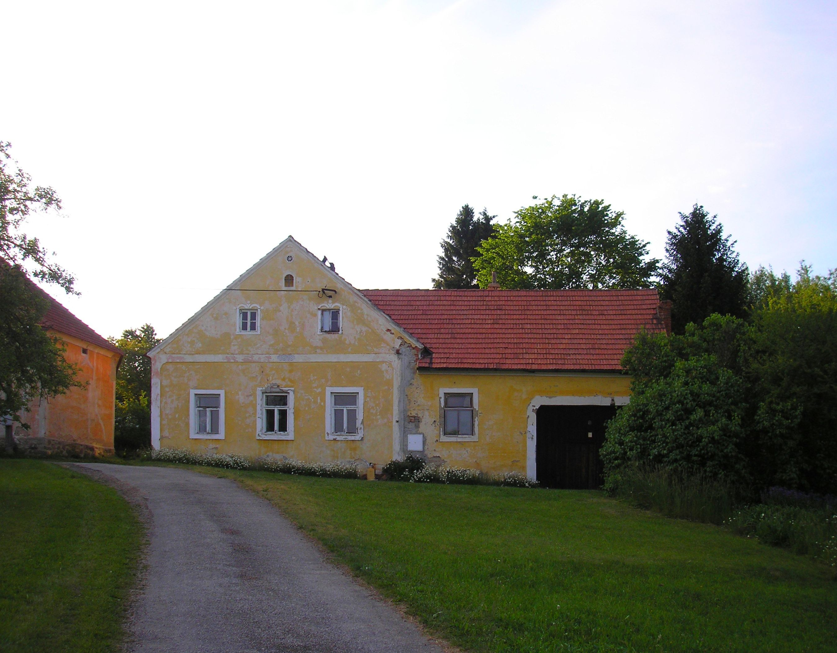 Dolní Vesce, část obce Římov v okrese České Budějovice